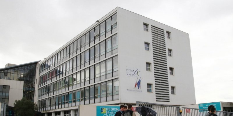 Batiment A vu de l’extérieur de l'enceinte de l'établissement